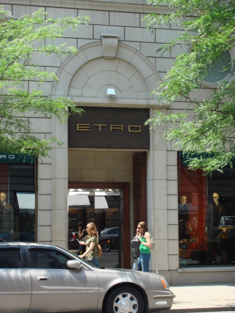 see title